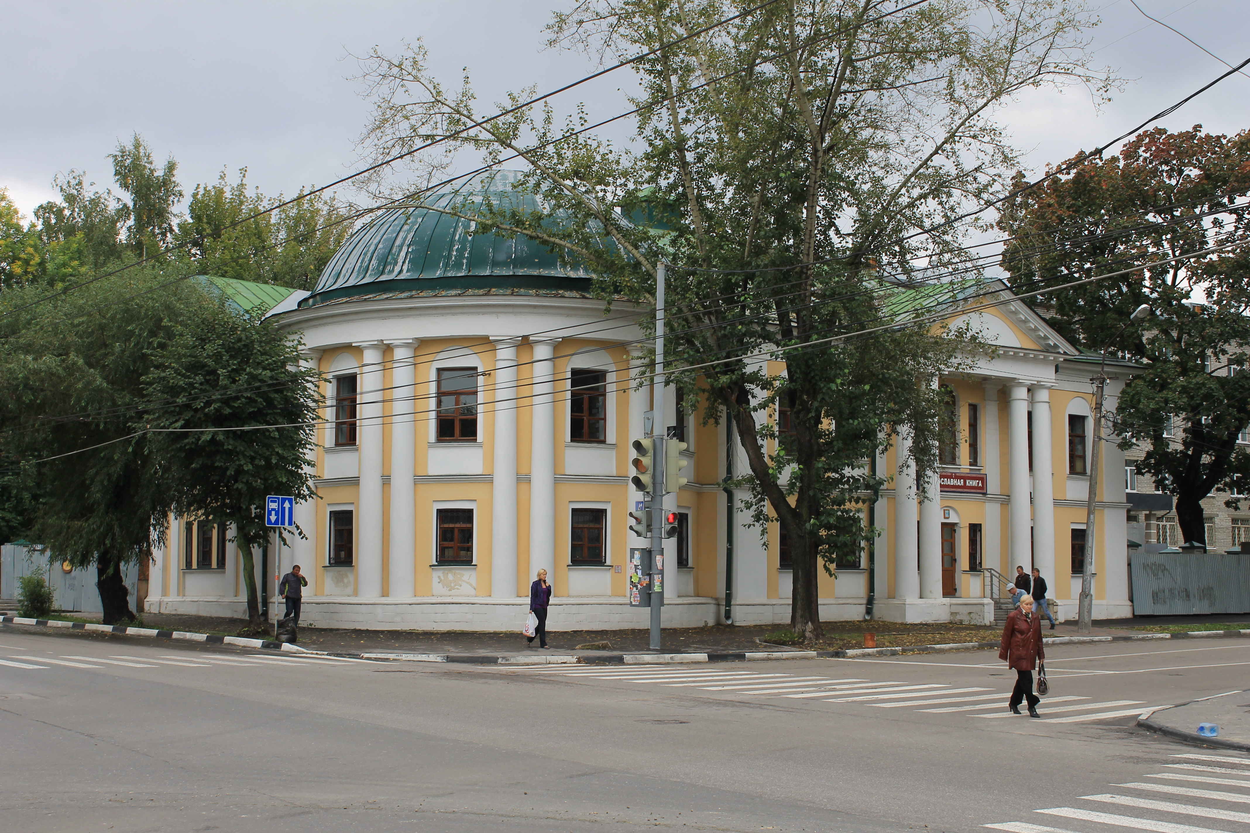 Мальшинская богадельня (перекресток улиц Маяковского и Свободы)